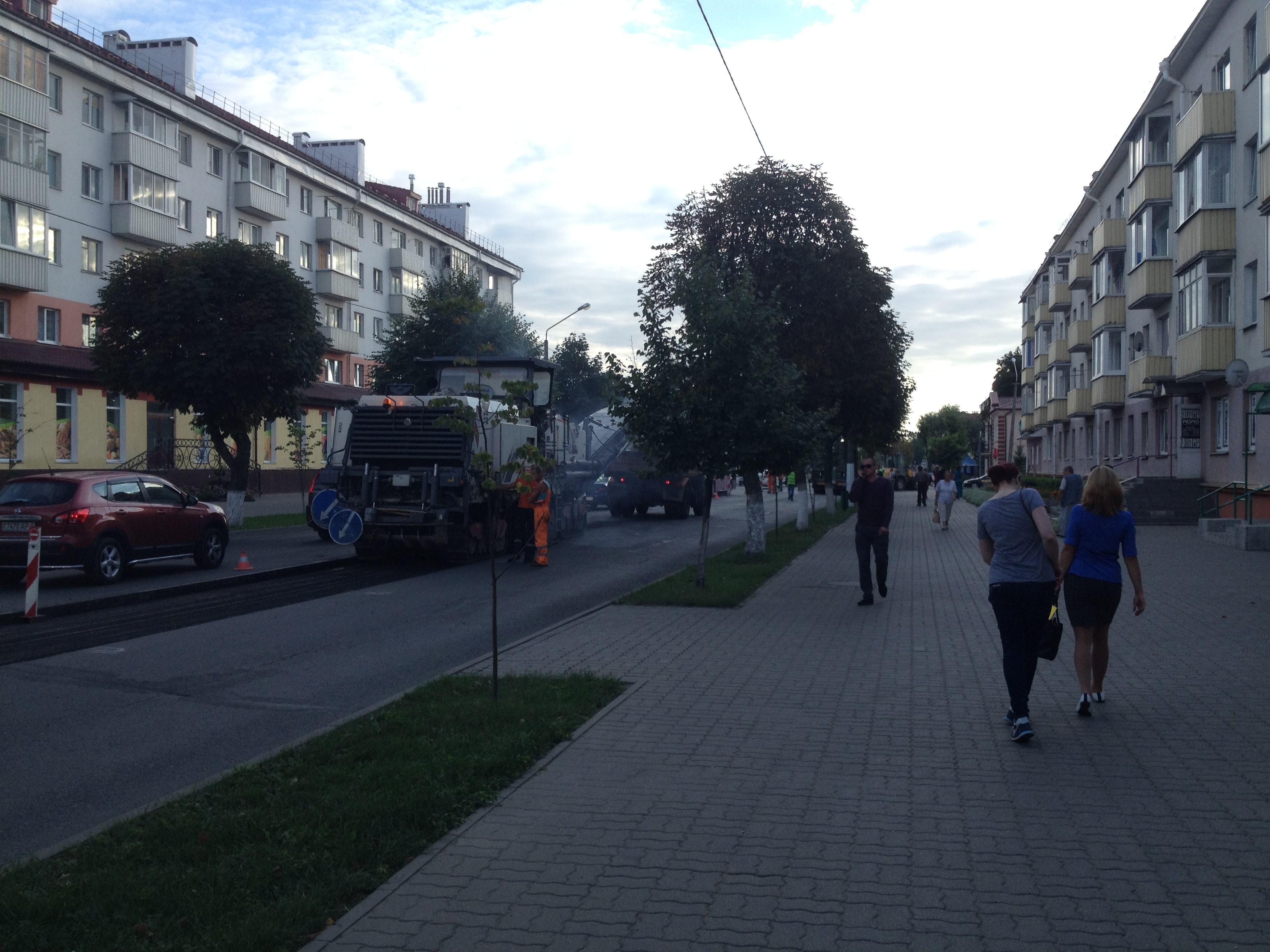 Słuck